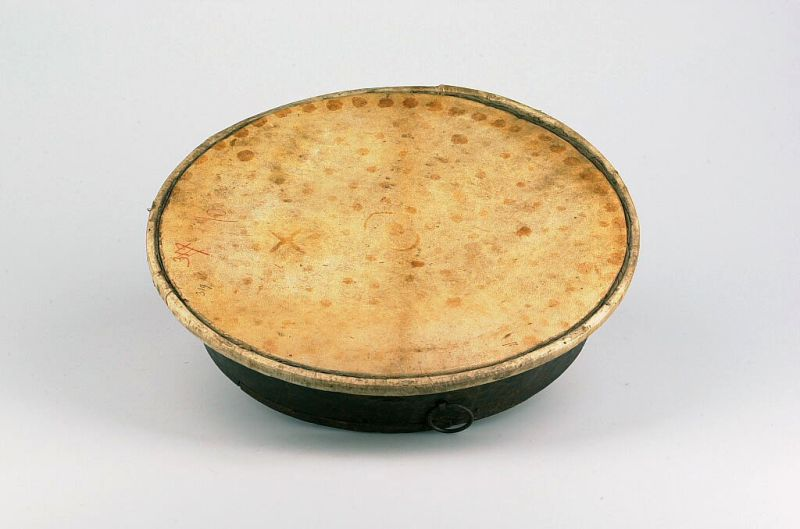 Slaginstrument. Tamboerijn Acèh: Rapa'i